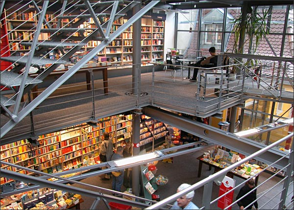 Blick in die Osiandersche Buchhandlung in Konstanz, Kanzleistraße